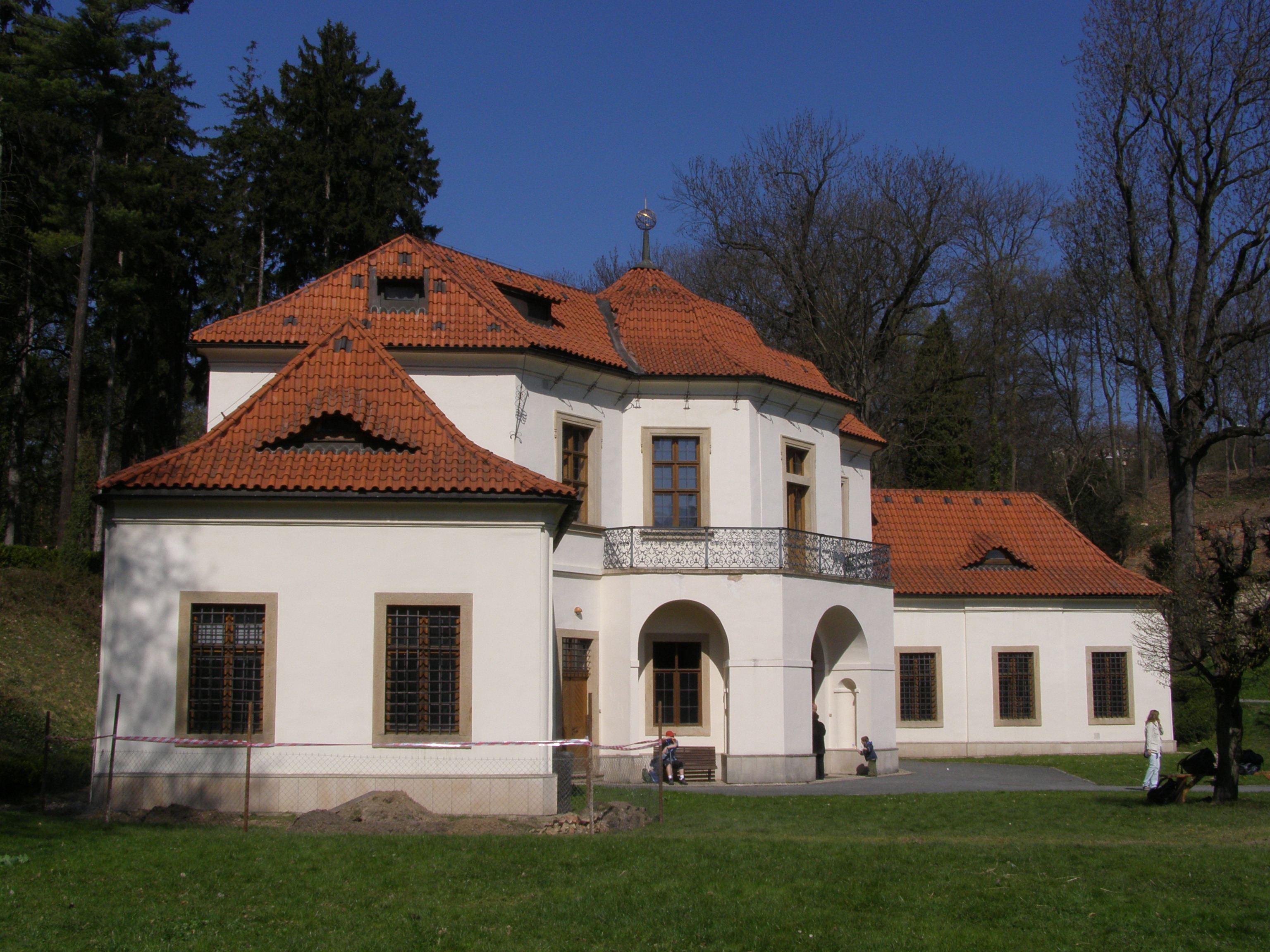 Praha, Břevnovský klášter, zahradní pavilon Vojtěška